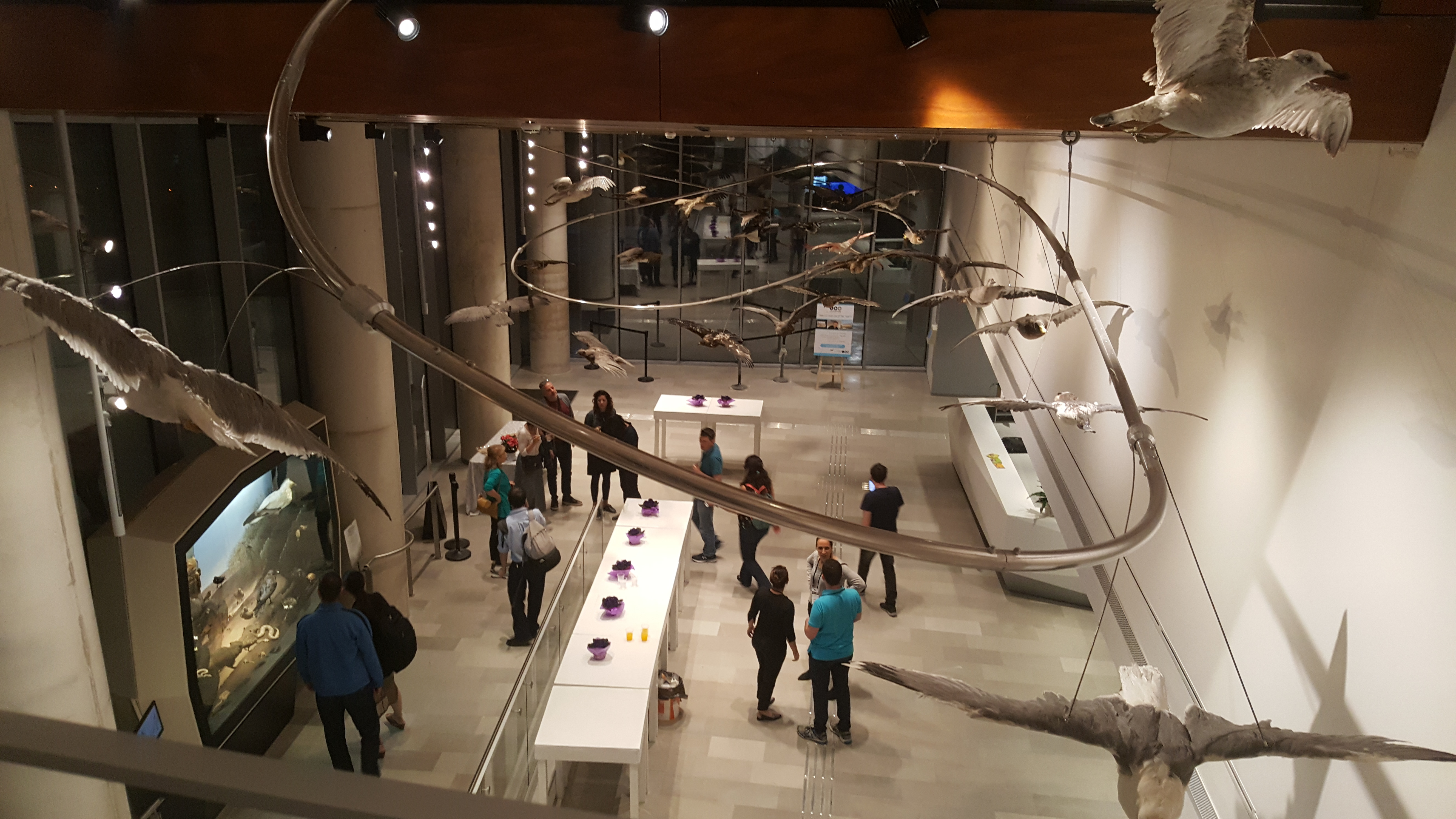 מוזיאון הטבע ע"ש שטיינהרדט, המרכז הלאומי לחקר המגוון הביולוגי, הוא מוזיאון ישראלי להיסטוריה של הטבע. המוזיאון, המוקם במסגרת אוניברסיטת תל אביב, עתיד להיות המוקד הגדול והפעיל ביותר של תיעוד ומדע בתחומי המגוון הביולוגי בישראל, וככזה תומך בפעילות ההגנה על הסביבה והחקלאות באזור.